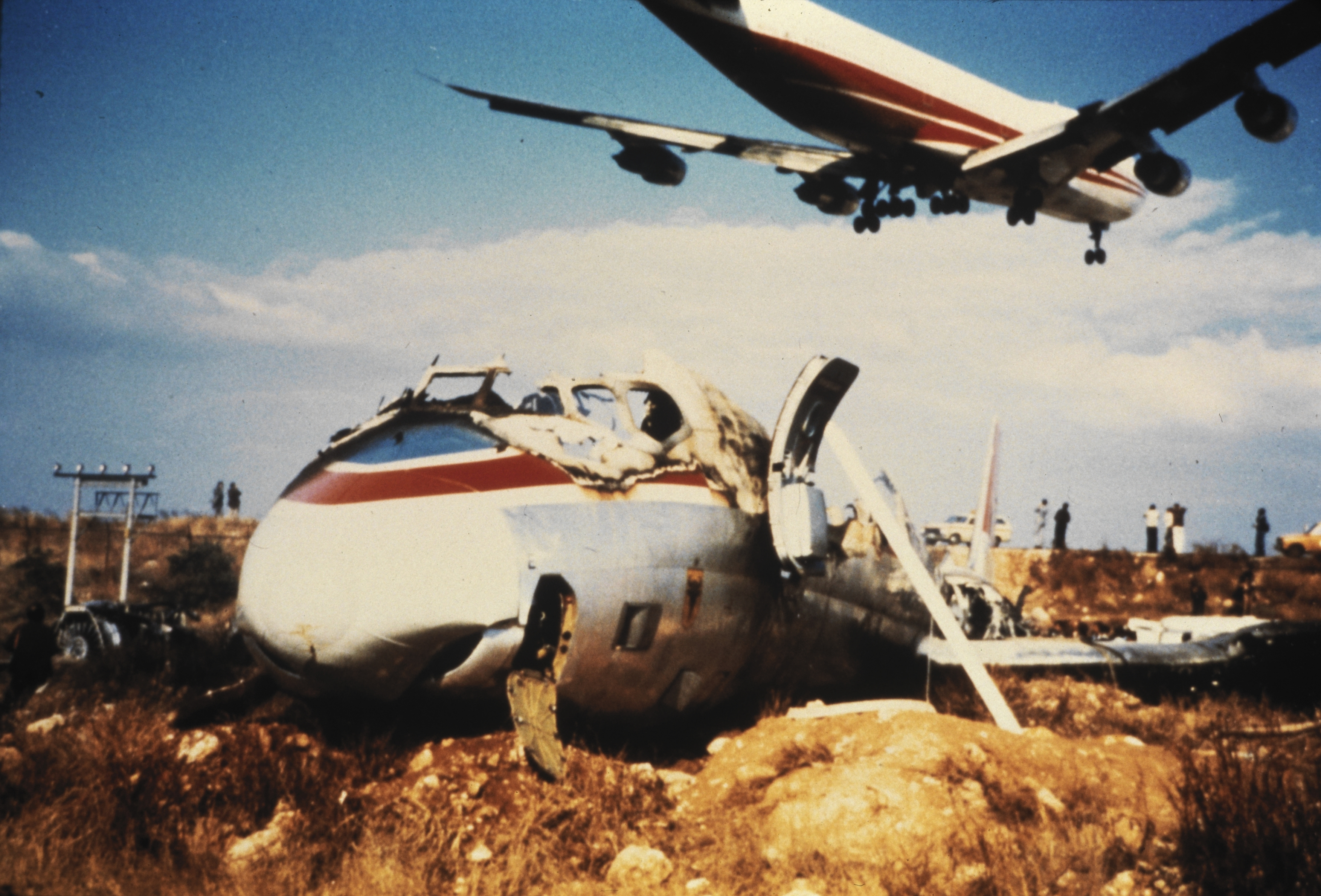 スイス航空316便は1979年10月7日にアテネ・エリニコン国際空港で着陸に失敗し、14人が死亡した。